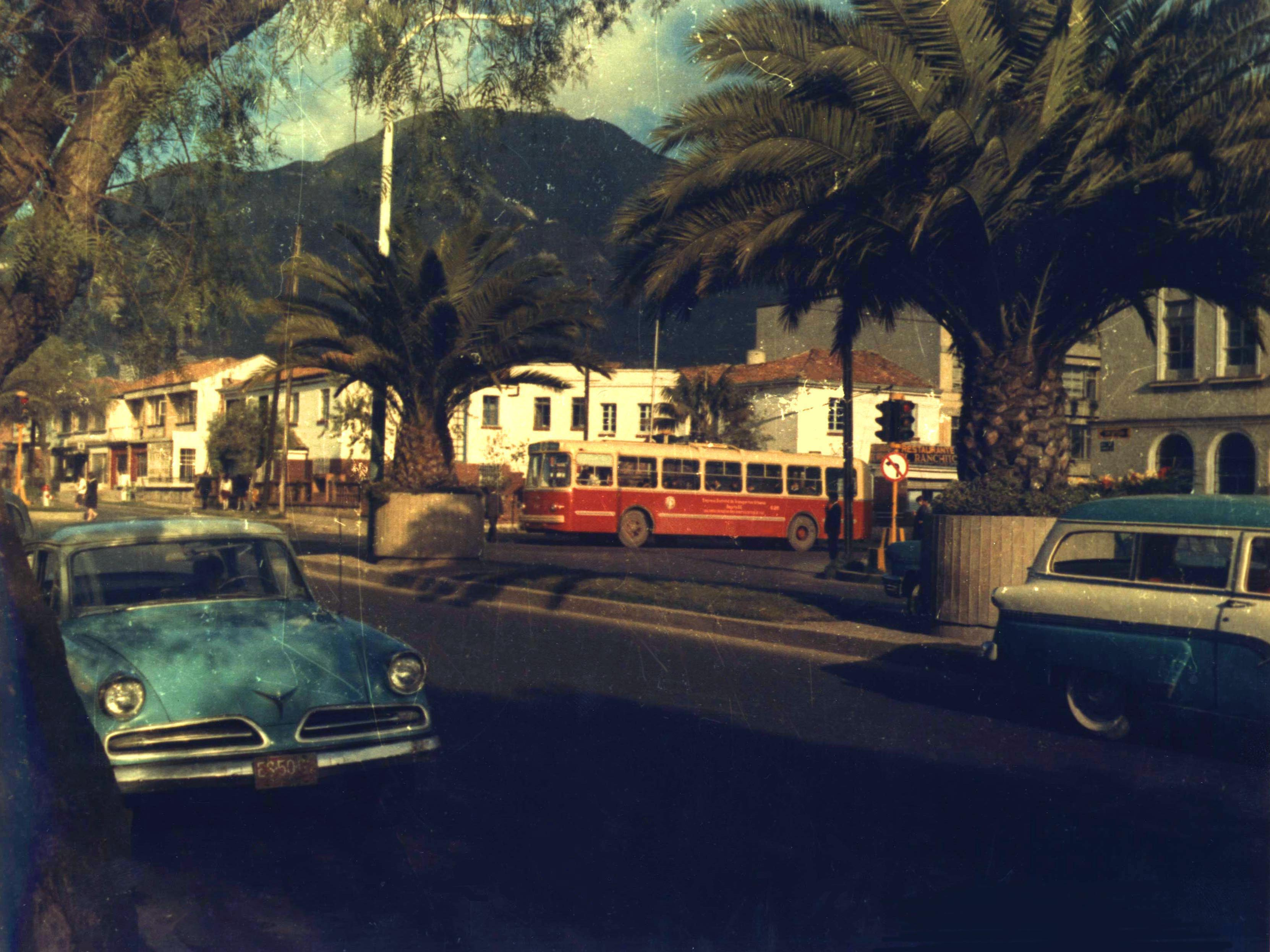 ЗиУ-5 в Колумбии